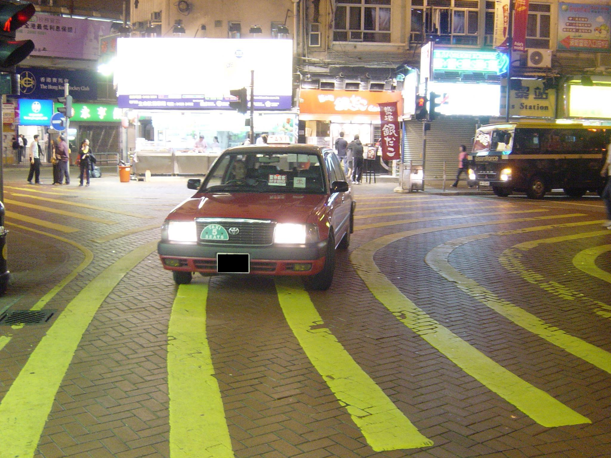 一輛泥鯭的出現在銅鑼灣時代廣場附近。A kind of taxi in Hong Kong.